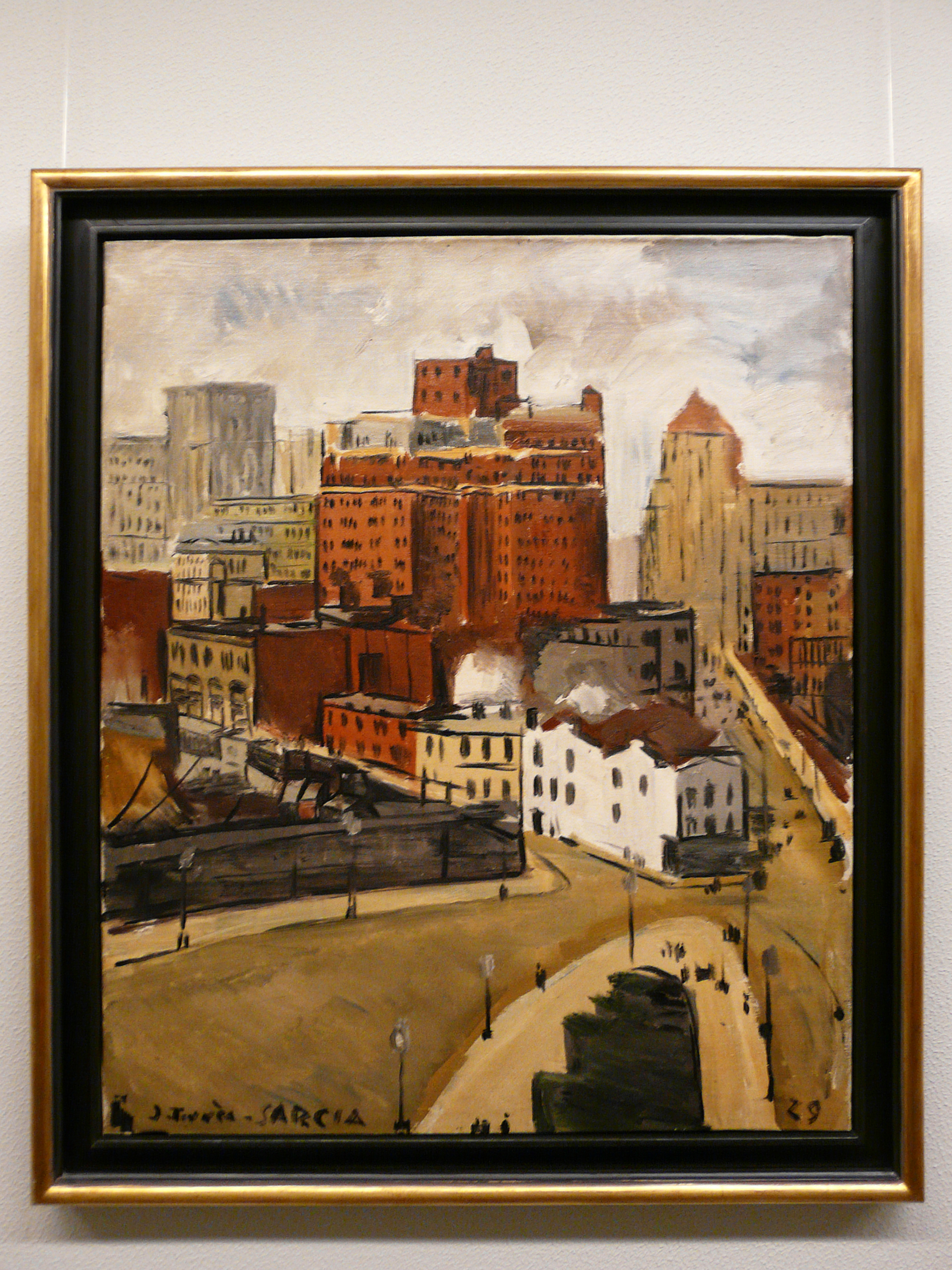 Нью-Йорк. Хоакин Торрес Гарсия